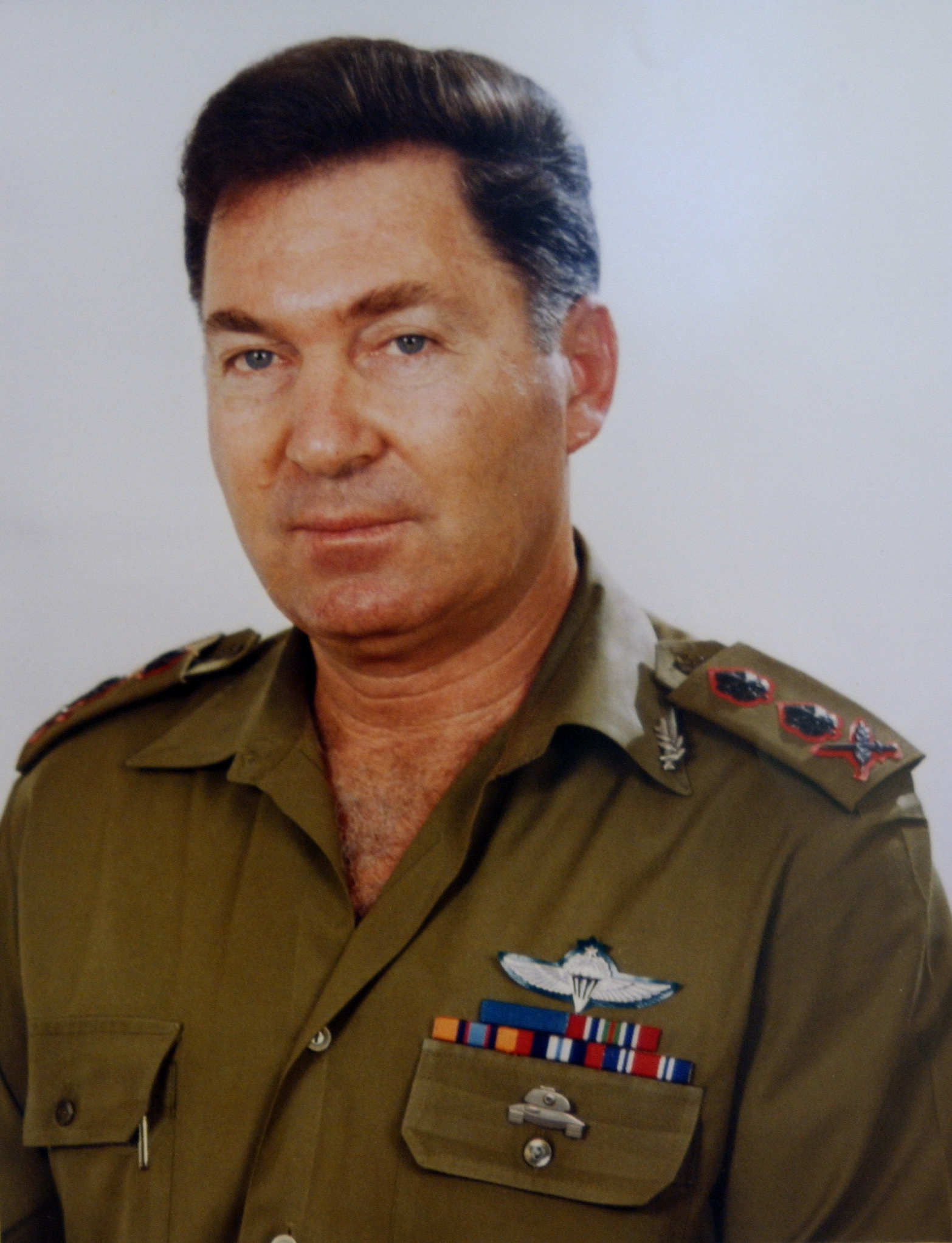 הרמטכ"ל רא"ל דן שומרון.